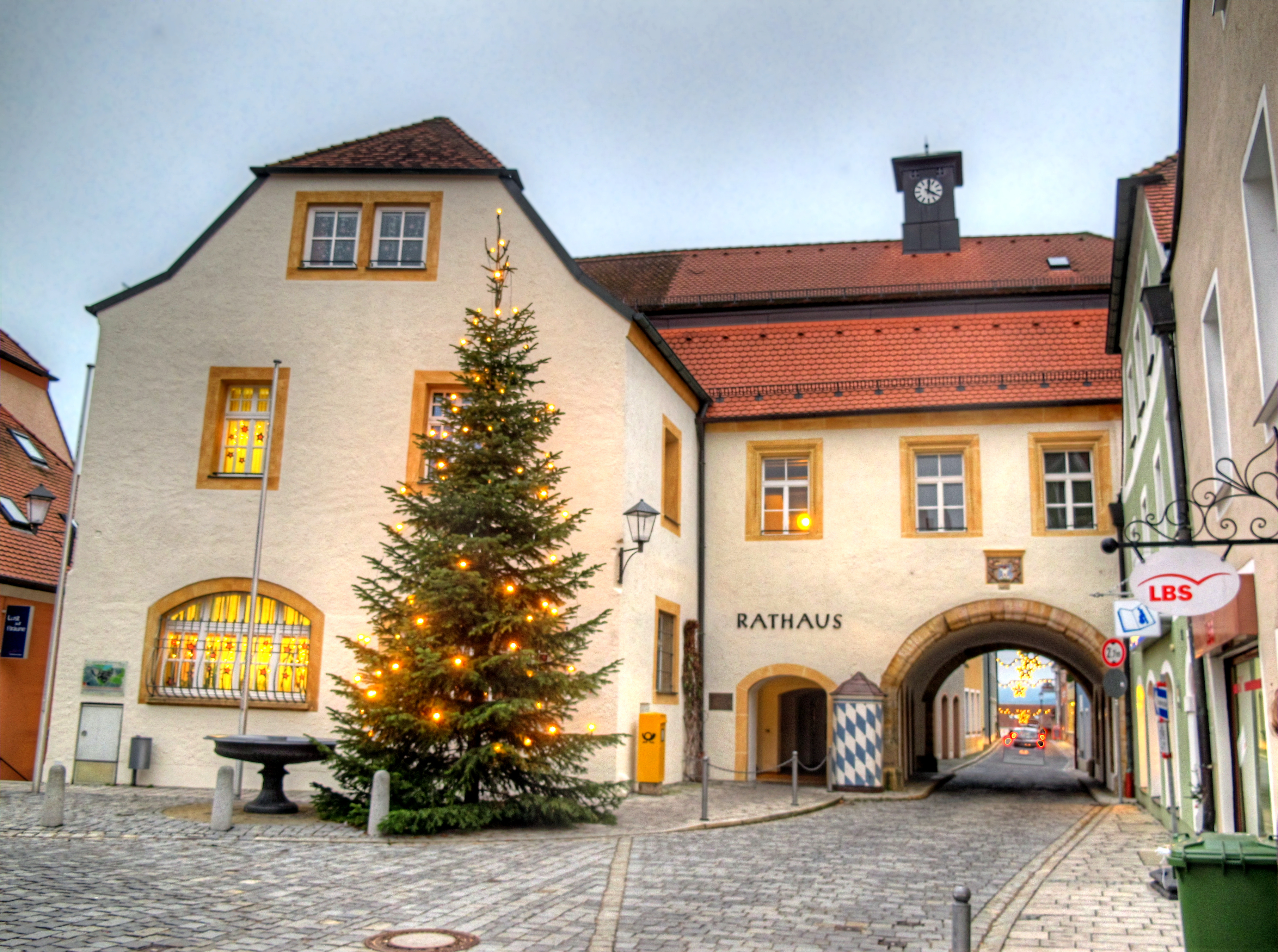 Deutschland, Bayern, Oberpfalz, Landkreis Schwandorf, Neunburg vorm Wald, Rathaus